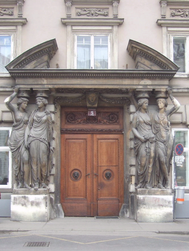 Wien: Portal des Palais Pallavicini am Josefsplatz mit vier von Franz Anton von Zauner gestalteten Karyatiden